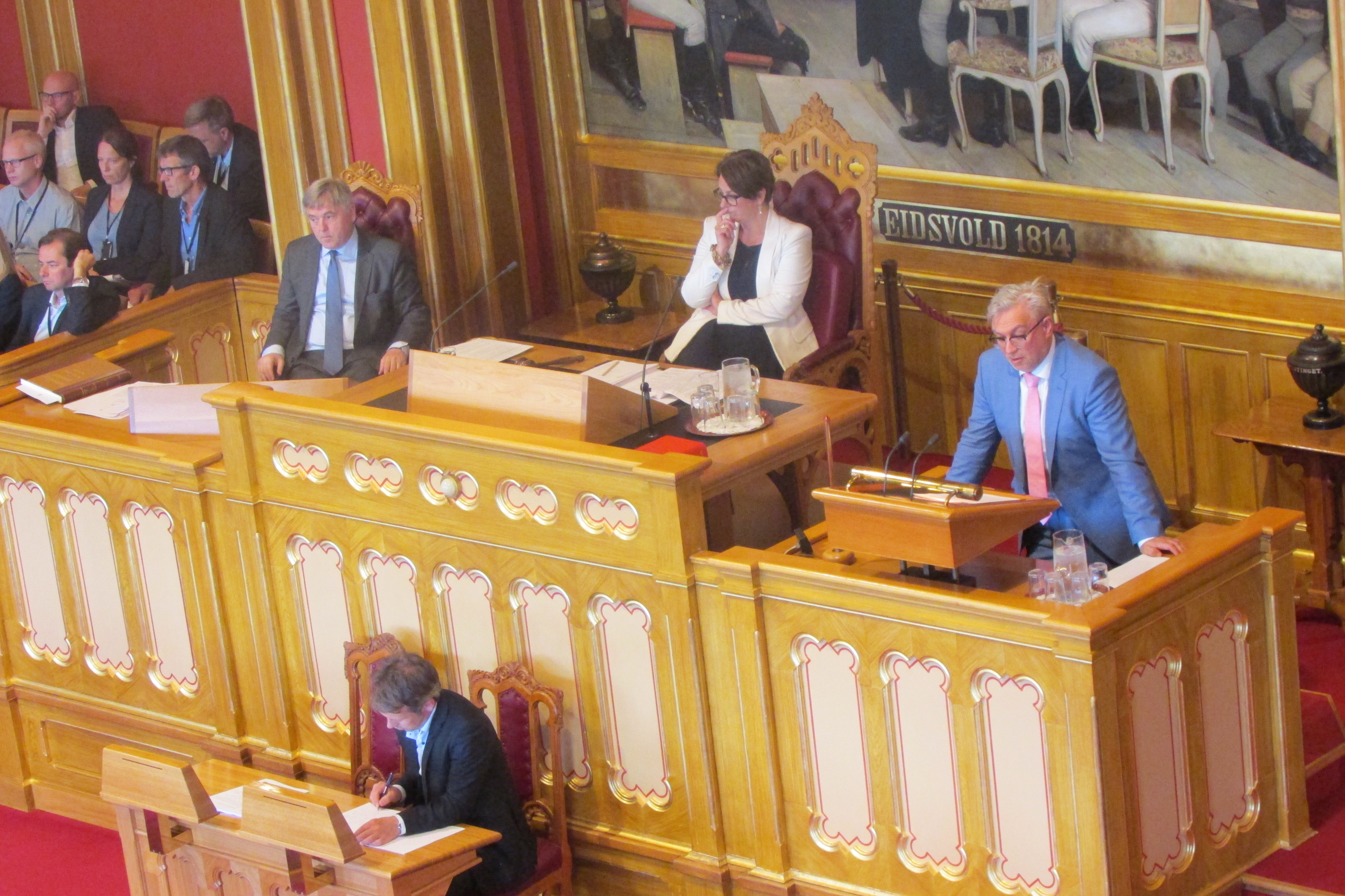 Stortingssalen, Stortingsbygningen